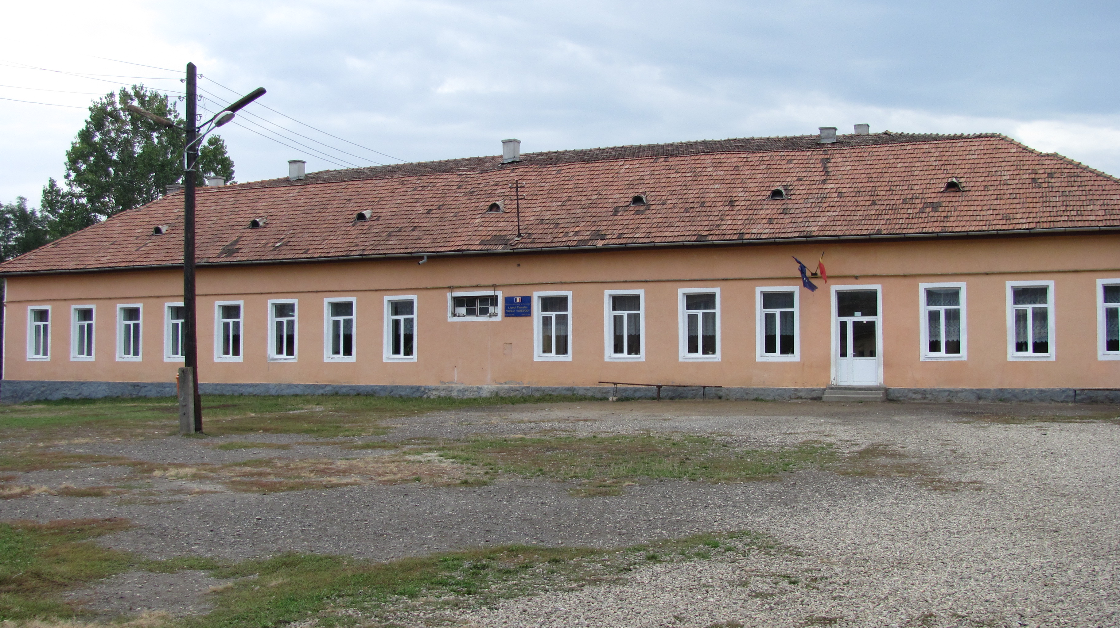 Gilău - Cluj- Liceul Teoretic “Gelu Voievod”